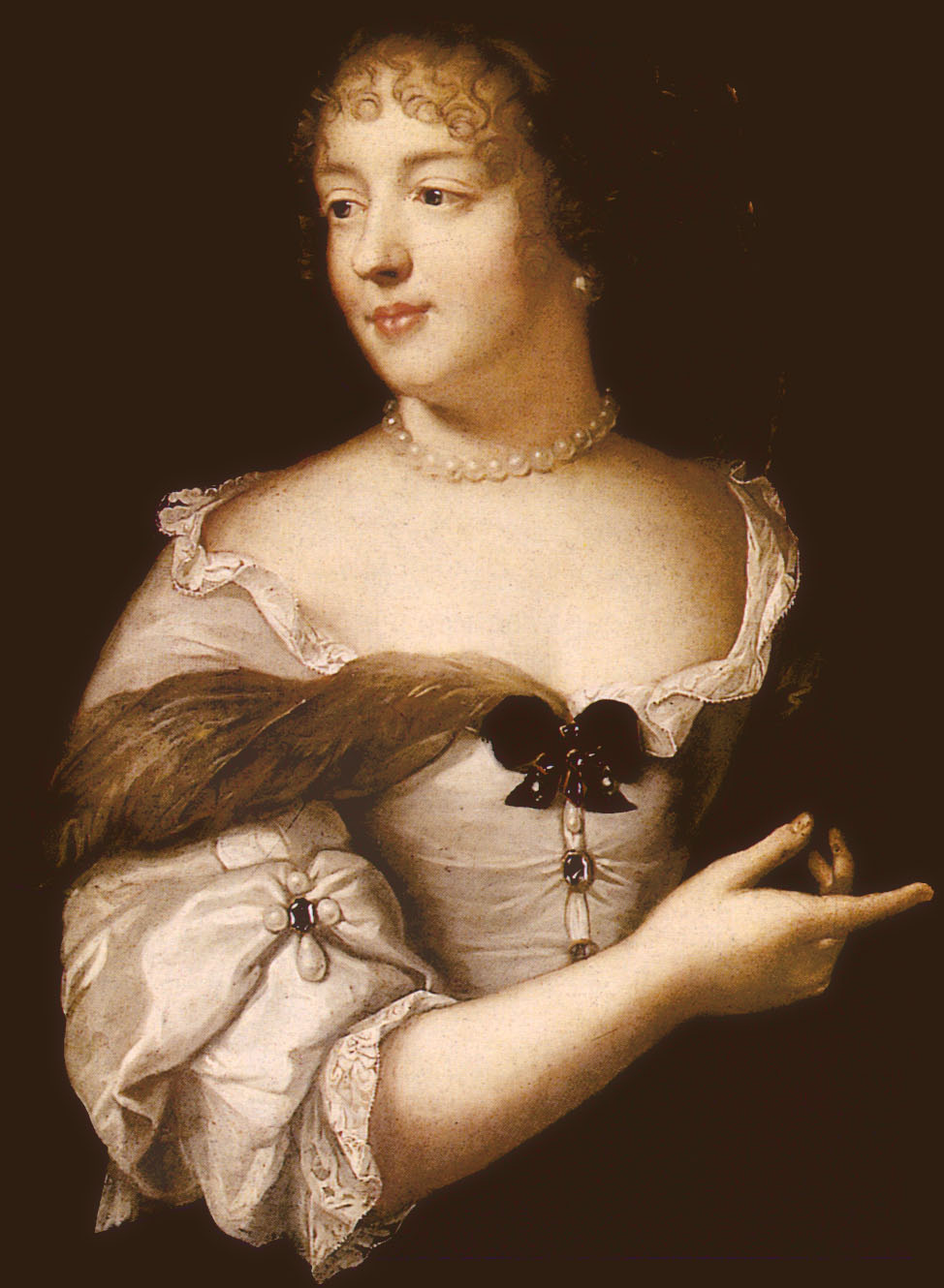 Portrait de Marie de Rabutin-Chantal, Marquise de Sévignétitle QS:P1476,fr:"Portrait de Marie de Rabutin-Chantal, Marquise de Sévigné" label QS:Lfr,"Portrait de Marie de Rabutin-Chantal, Marquise de Sévigné" label QS:Lde,"Porträt Marie de Rabutin-Chantals, Marquise de Sévigné"